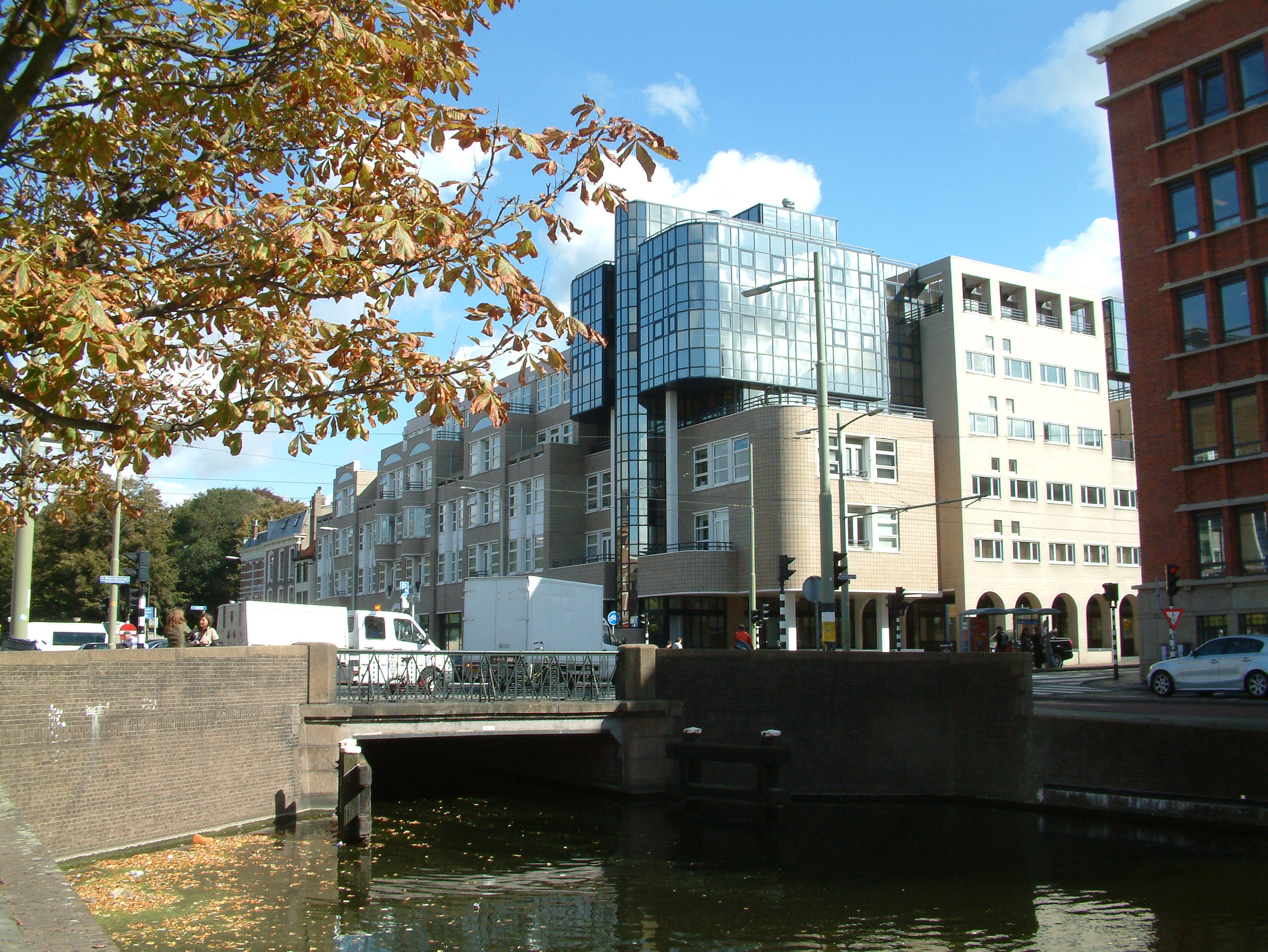 Brug in Den Haag